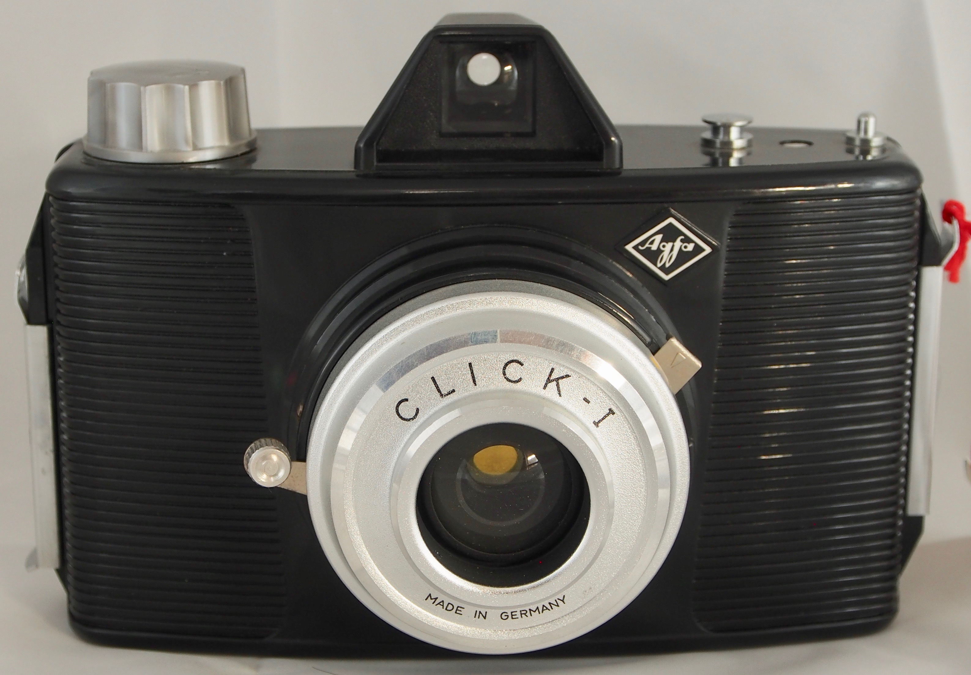 Click I Kadl# 1292